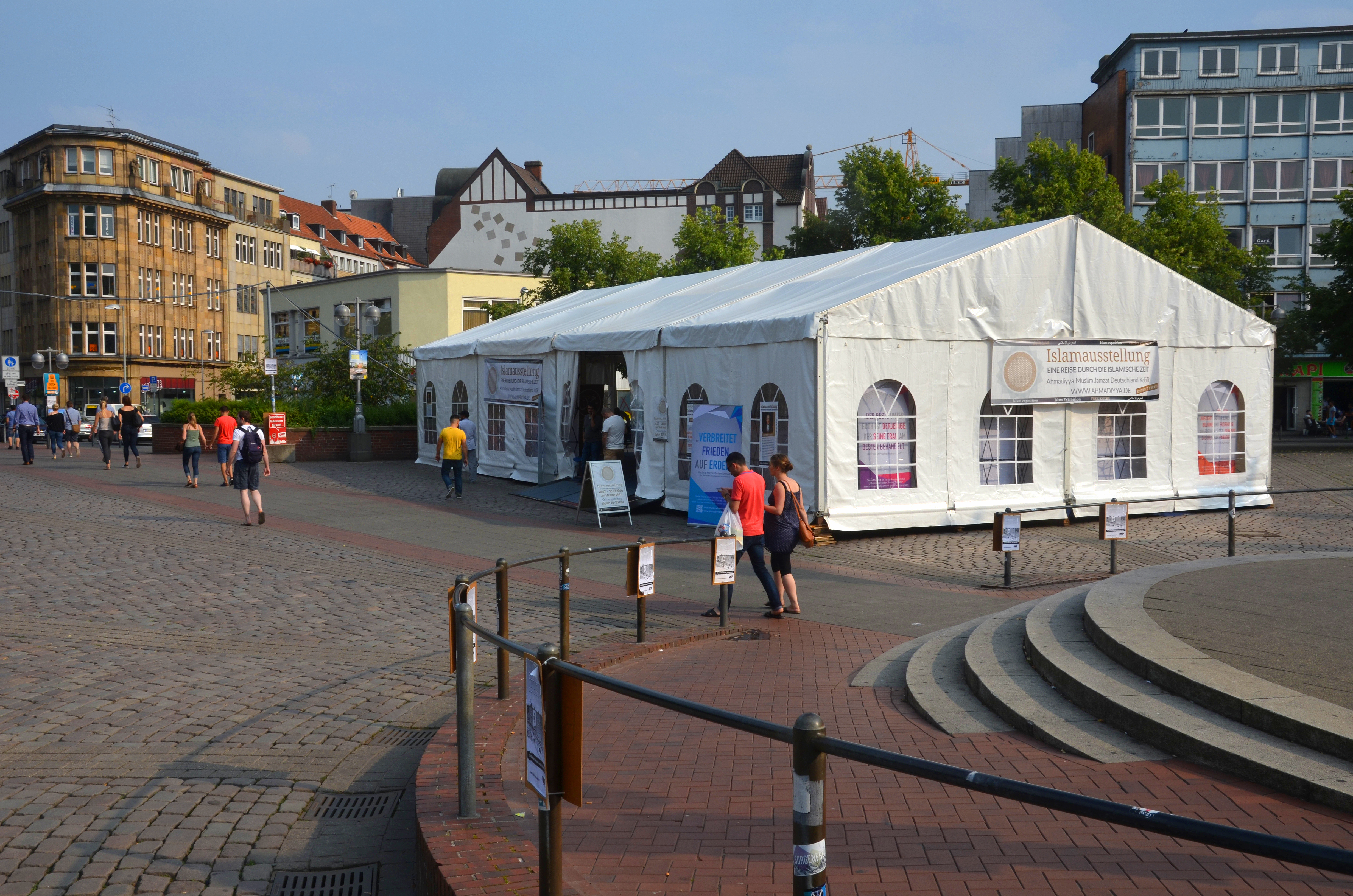 Die Gemeinde Ahmadiyya Muslim Jamaat Deutschland KdöR organisierte vom 26. bis 30. Juli 2016 eine "Islamausstellung" auf dem Platz Am Steintor in Hannover ...